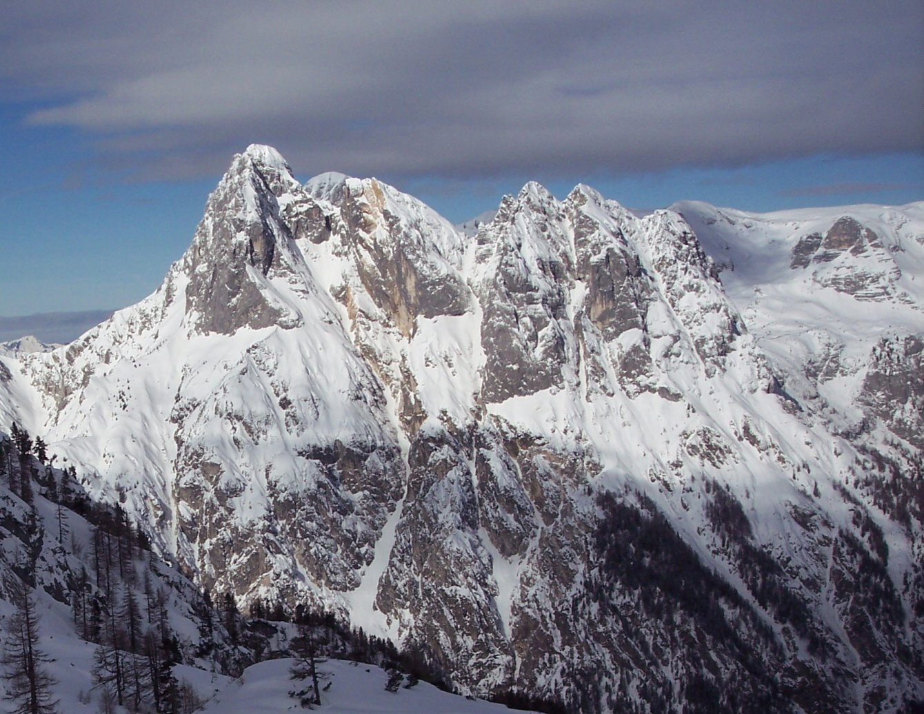 The 'Mühlsturzhörner' and the 'Grundübelhörner' (Reiter Alm, Berchtesgaden, German-Austrian border) seen from south-east, February 2006